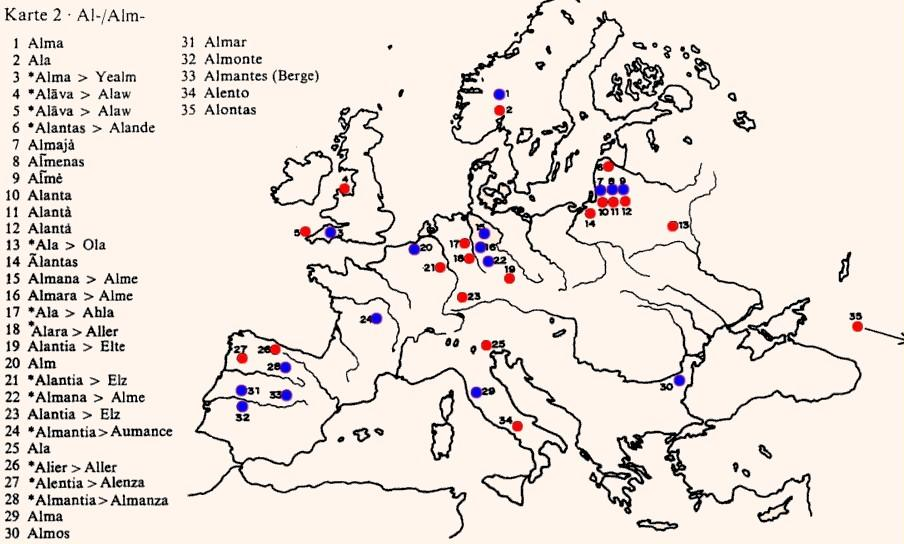 Hidrónimos antiguos europeos. Carta para la raíz *al-, *alm